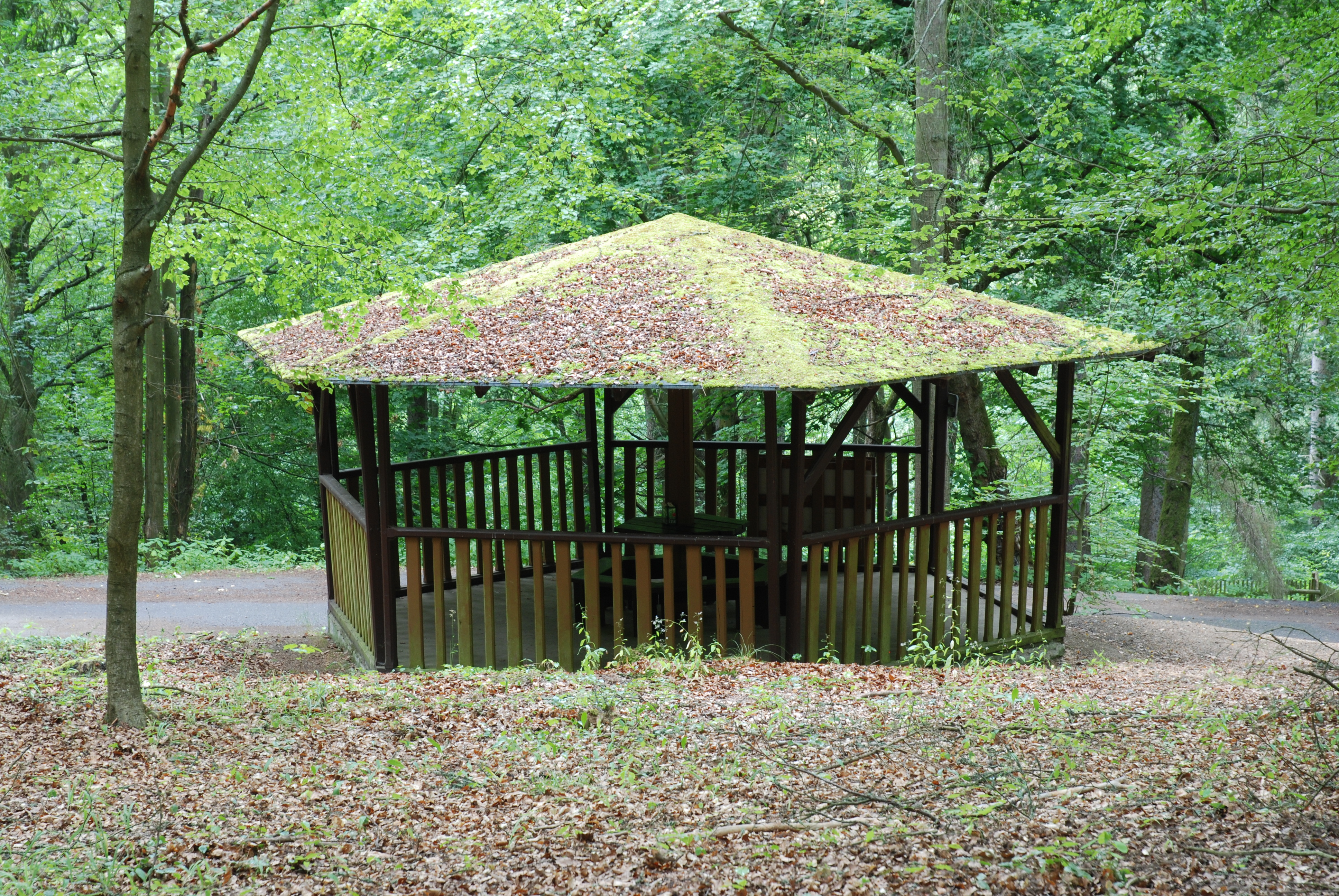 Beethovenův altán v karlovarských lázeňských lesích